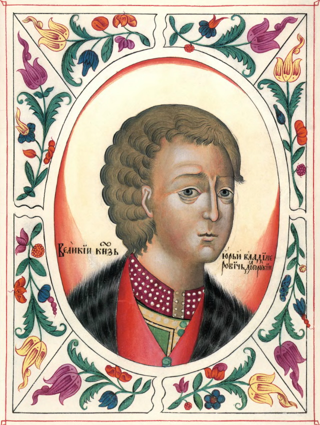 Юрий Долгорукий